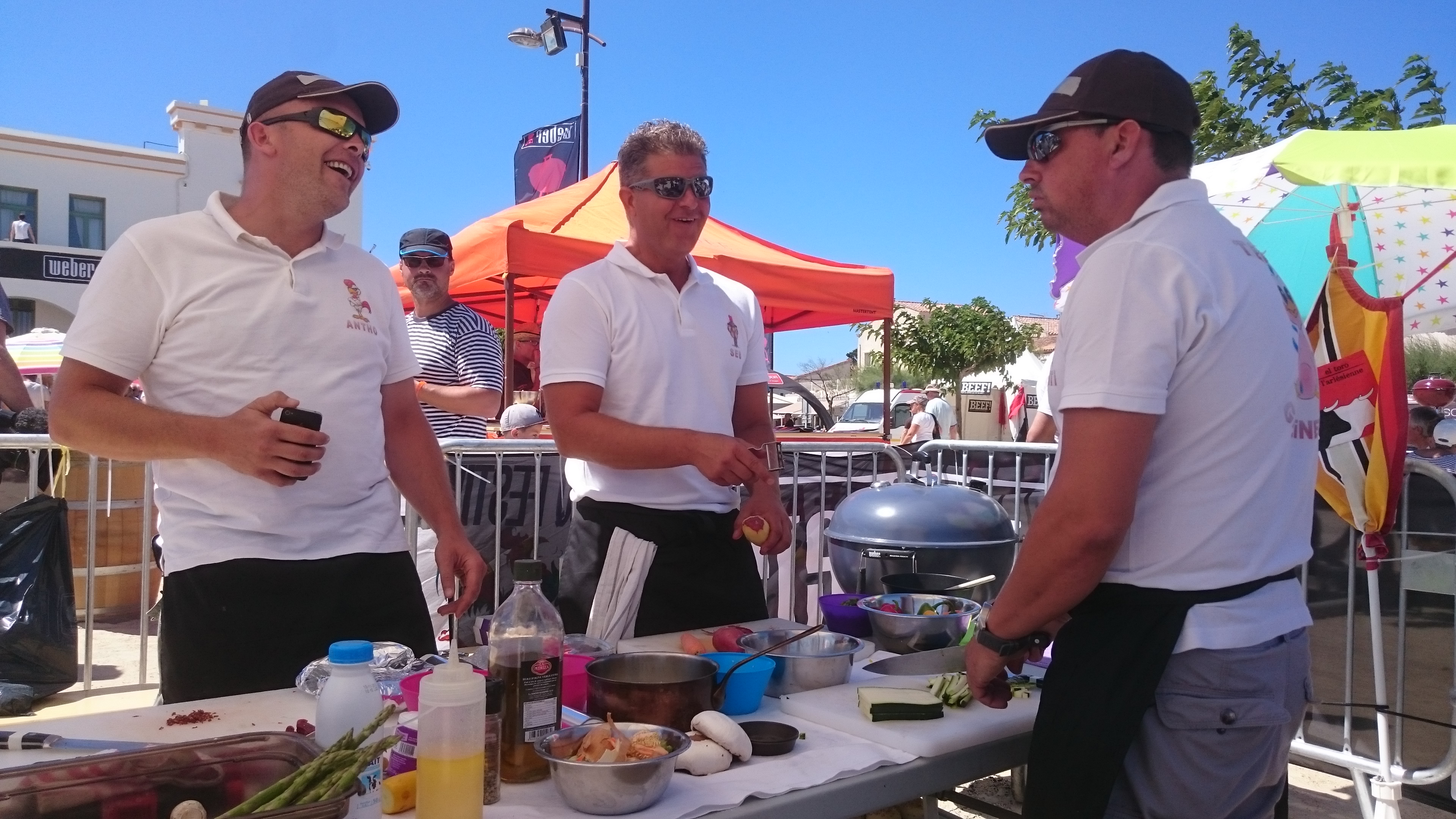 La TEAM GALINETTE lors du Championnat de France de barbecue 2015